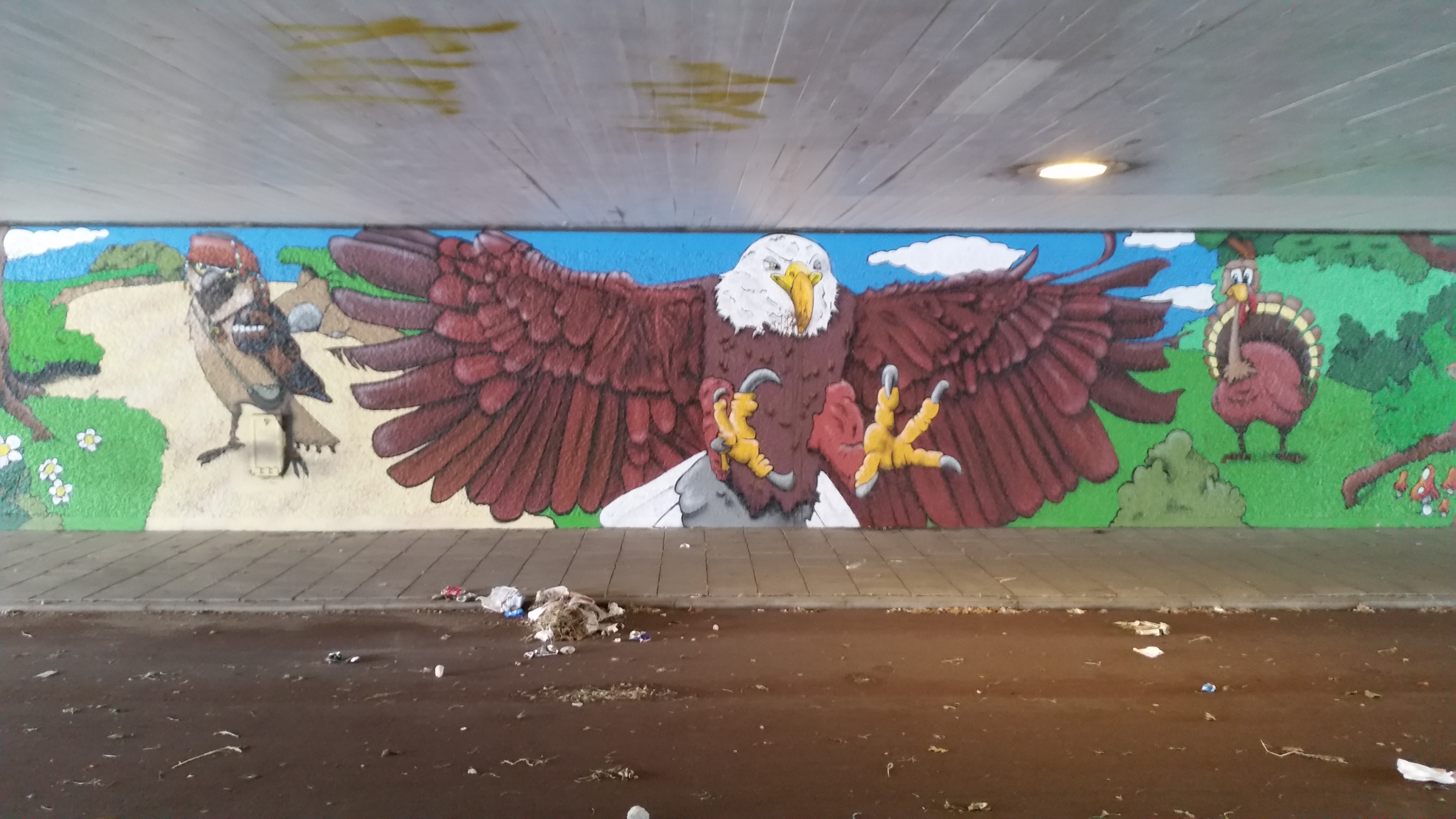 Brug 493 in Amsterdam-Noord, deel3 van de faunamural, de adelaar